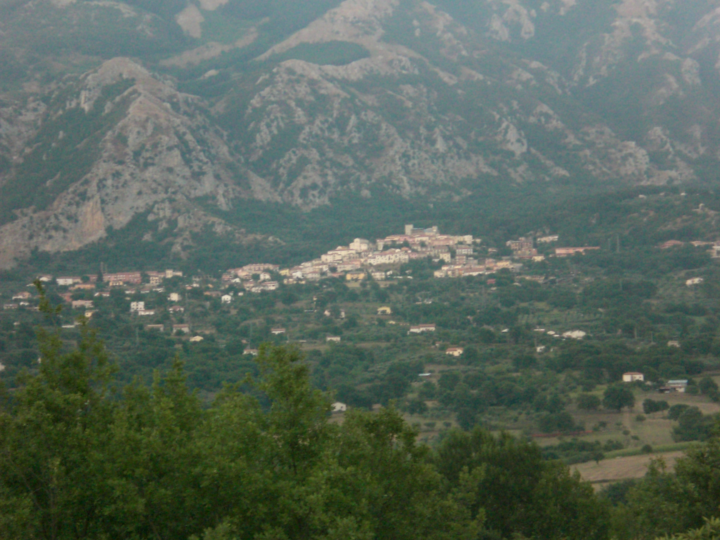 Panorama di Valva